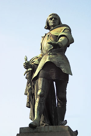 Bubenberg-Denkmal in Bern (7. Juni 2003)